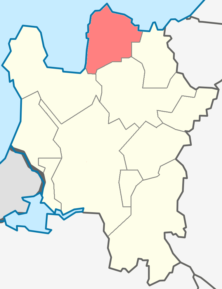 Вистинское сельское поселение на карте Кингисеппского района